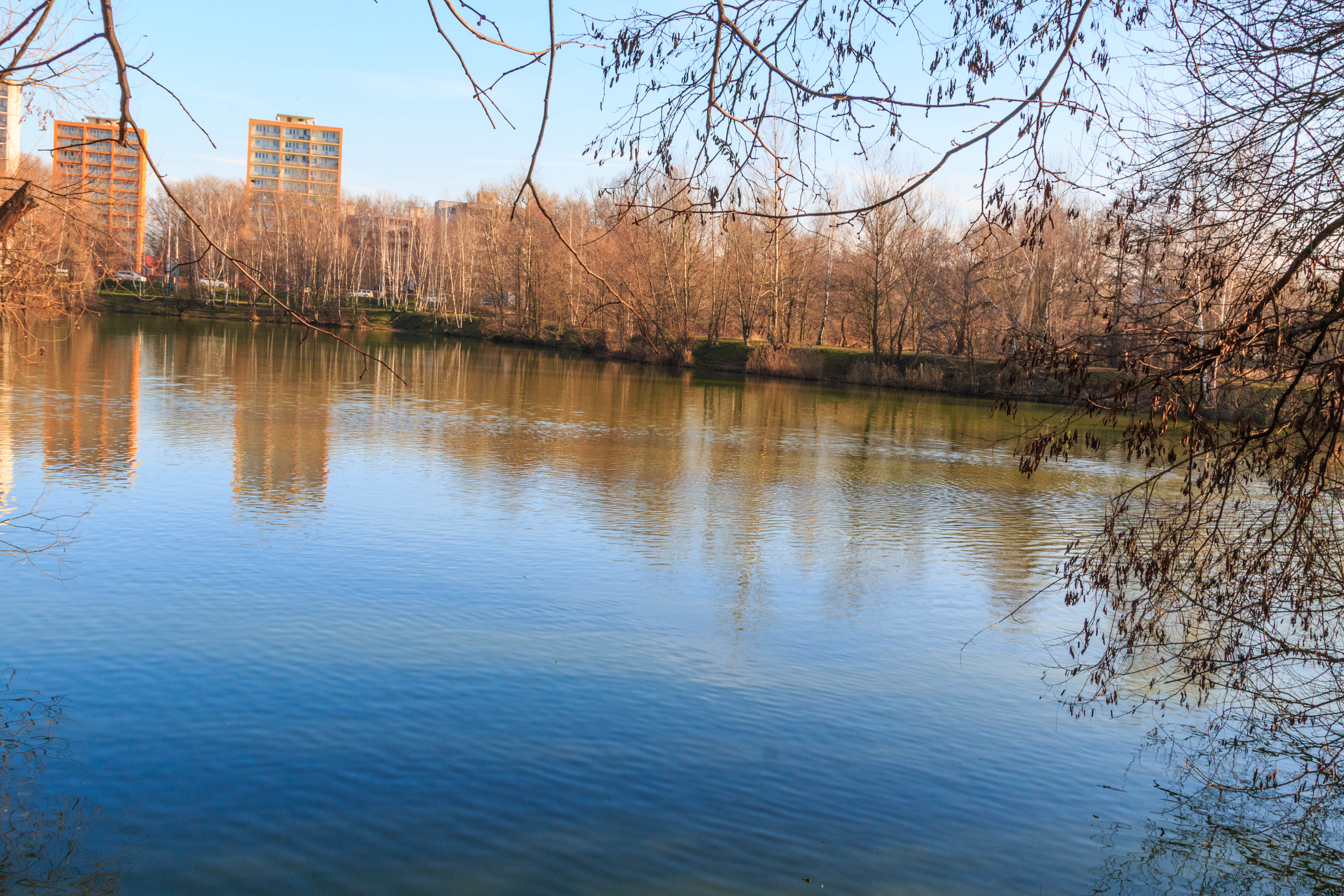 Bajkal v Pardubicích Project: Vodstvo.